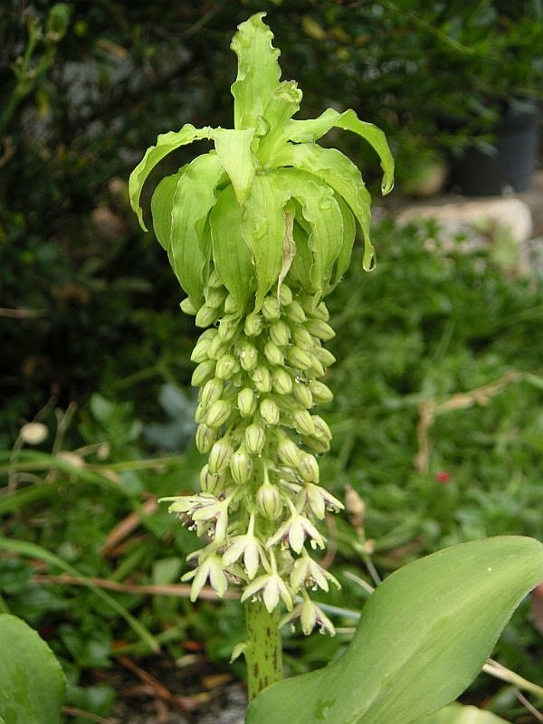 Eucomis bicolor, Gradignan, Gironde, France